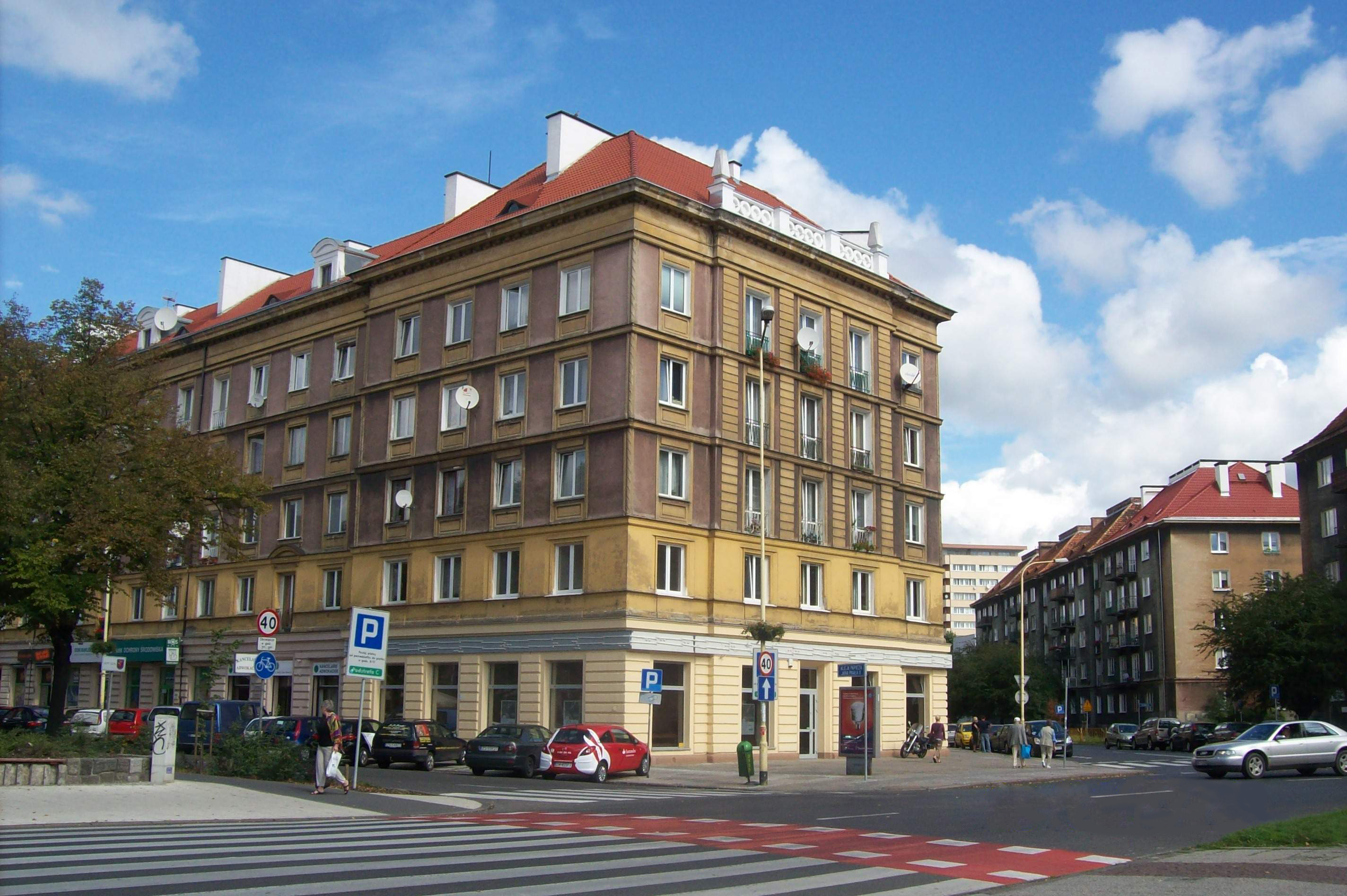 Śródmiejska Dzielnica Mieszkaniowa w Szczecinie